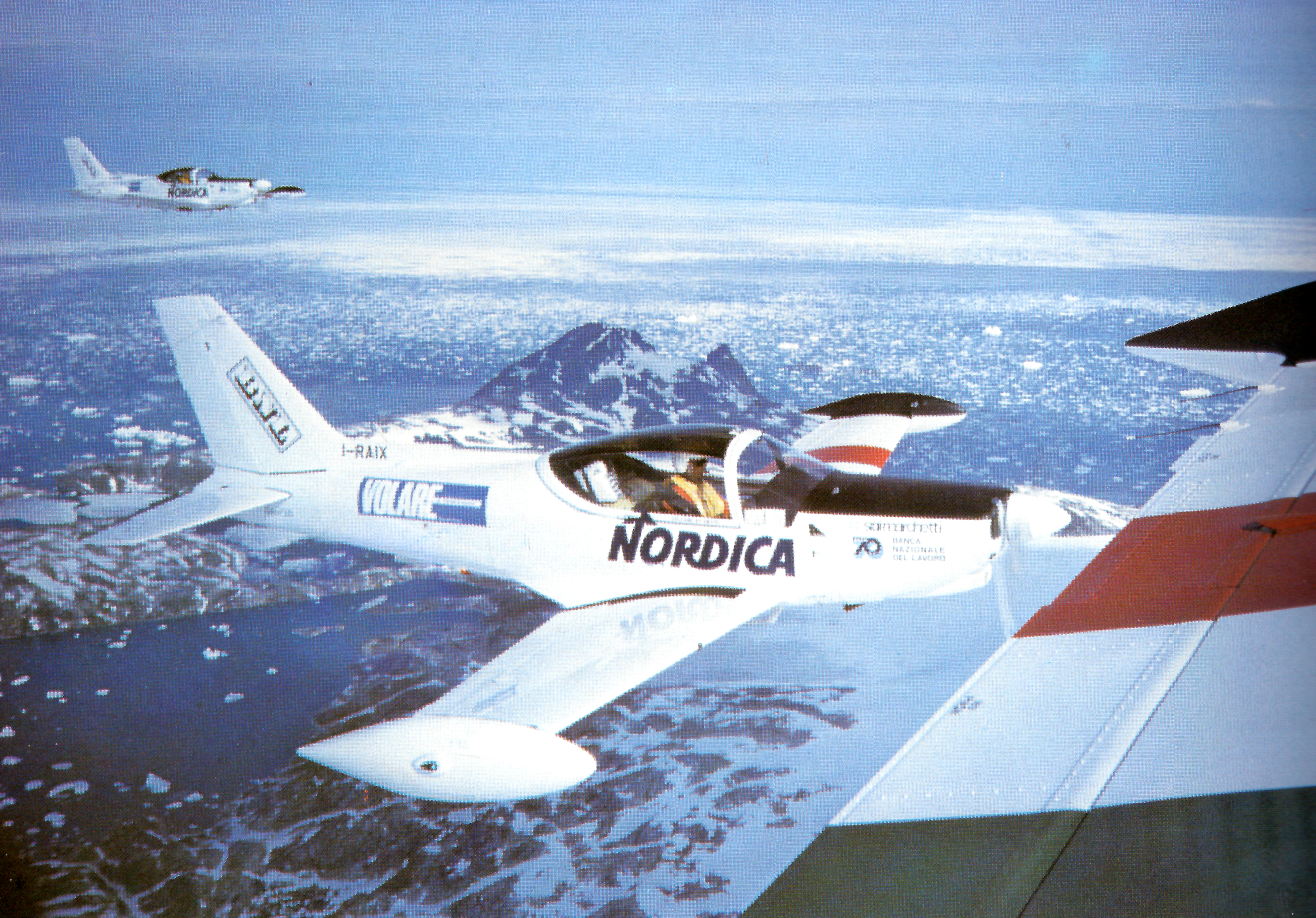 Trasvolata SF-260 Aermacchi